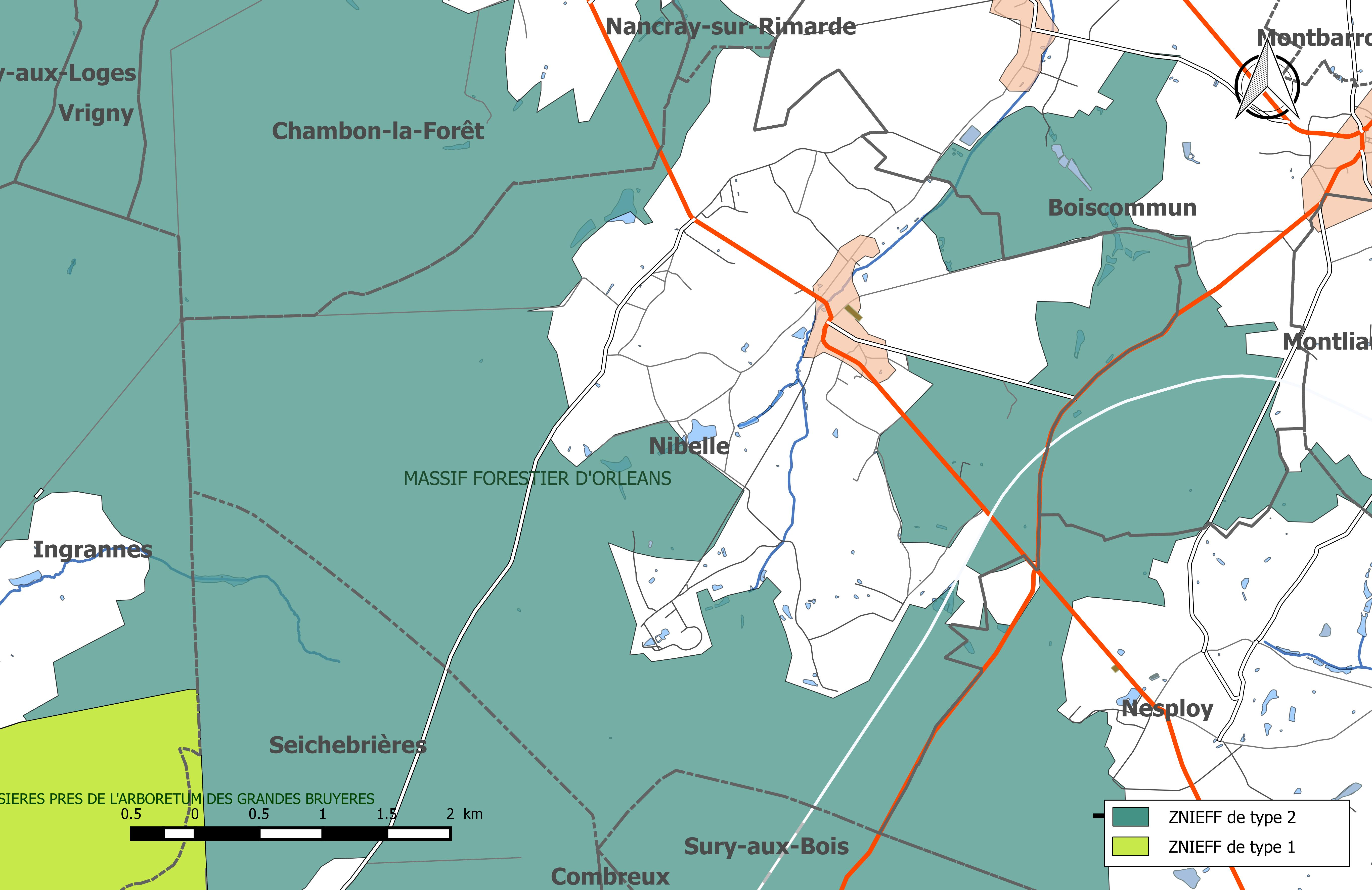 Carte des Zones naturelles d'intérêt écologique faunistique et Floristique (ZNIEFF) de la commune de Nibelle.